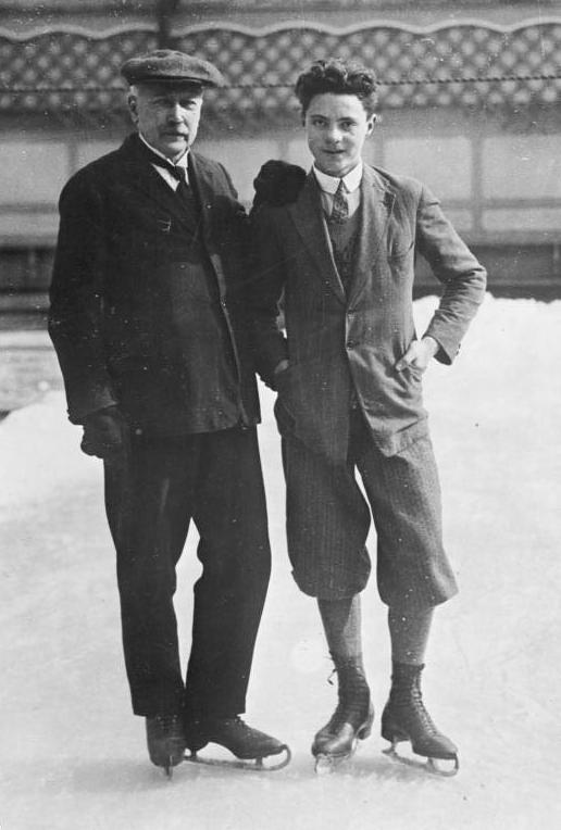 Meister des Schlittschuhes! Der jetzige Weltmeister im Eiskunstlaufen Karl Schäfer (rechts) mit seinem Entdecker, dem ersten Europameister Ober-Baurat Eduard Engelmann, der Besitzer der ersten Wiener Kunst-Eisbahn.